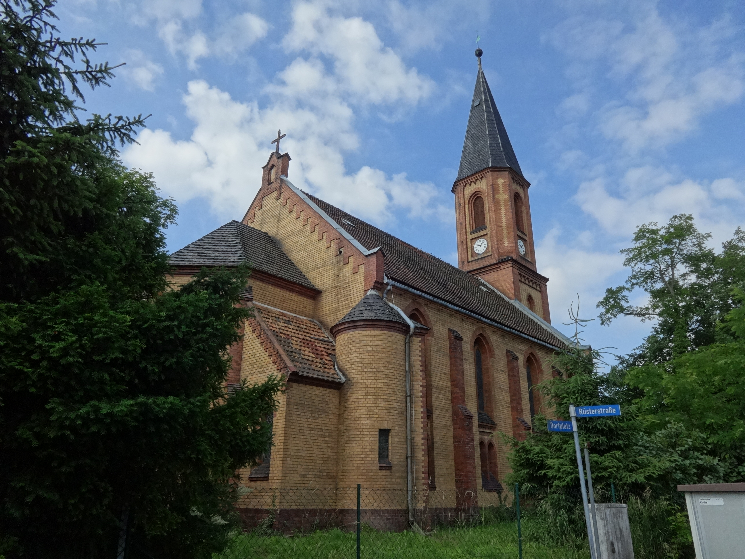 Die Dorfkirche Oderin entstand im Jahr 1894 vermutlich auf den Überresten eines Vorgängerbaus aus dem 17. Jahrhundert. Der streng gegliederte, neugotische Ziegelbau besitzt einen aufwendig gearbeiteten Westturm mit einer polygonalen Apsis.